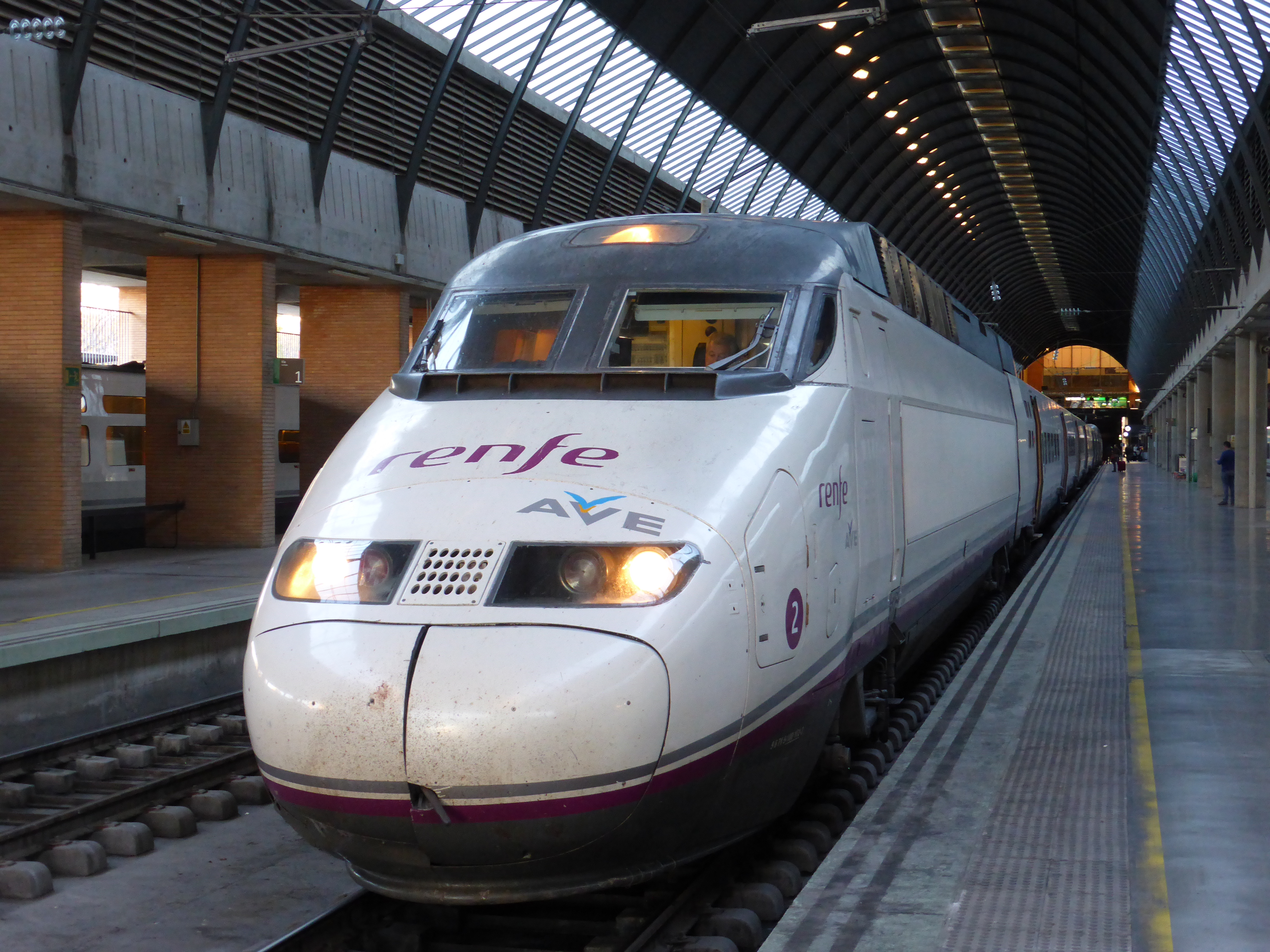 En el interior de la estación ferroviaria de Sevilla-Santa Justa, vemos un tren AVE, Serie 100 de Renfe, con destino Madrid, en 2015. Fue la primera serie de trenes de alta velocidad que entraron en servicio en España, en el año 1992.